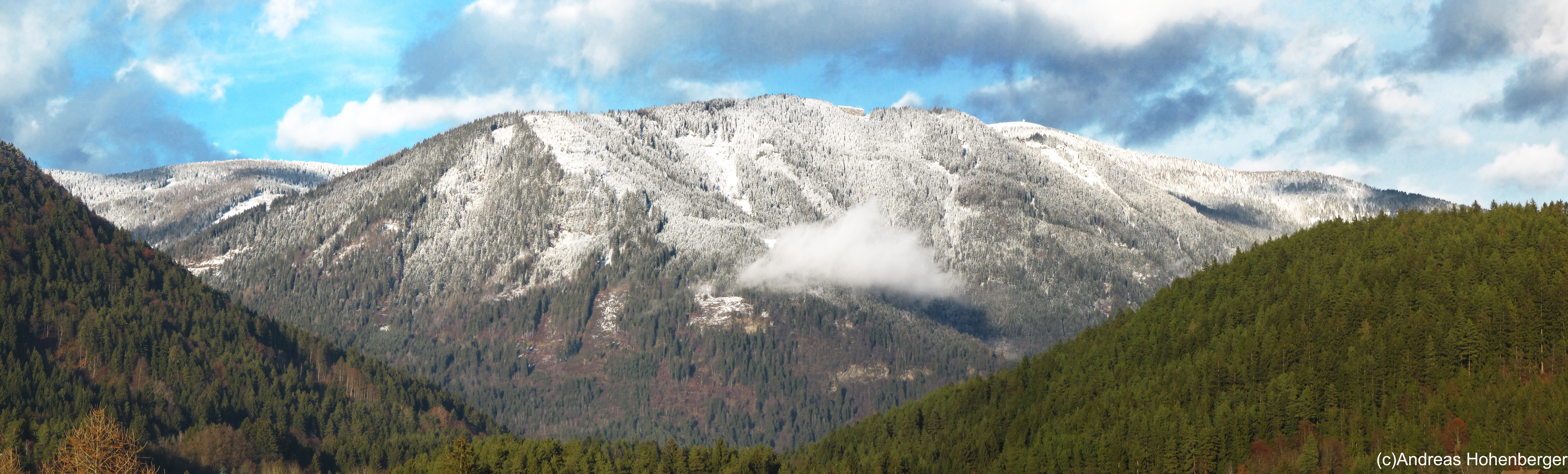 Die Gerlitzen ist ein Nockberg in Kärnten und liegt an der nördlichen Seite des Ossiacher Sees.